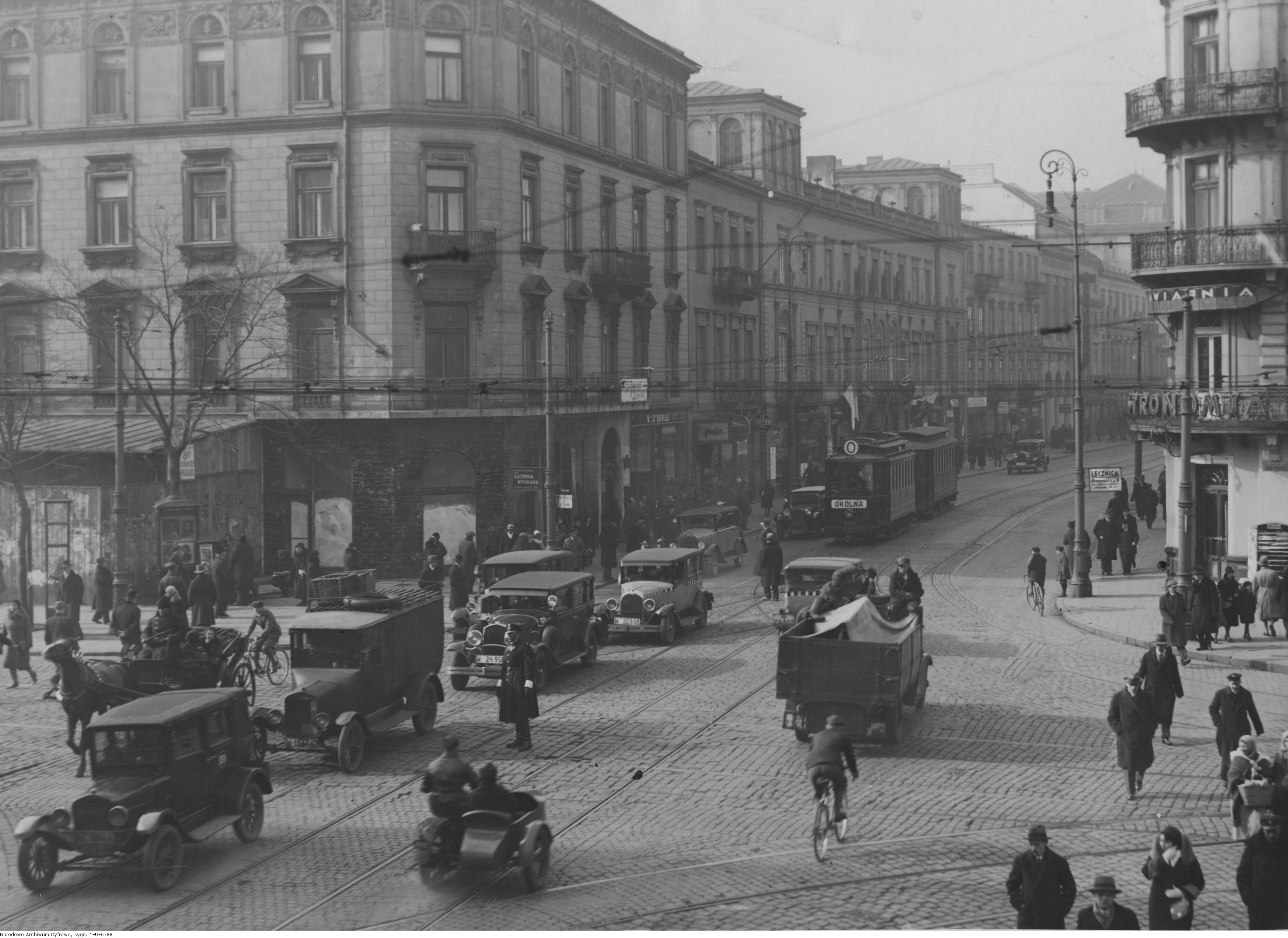 Warszawa. Skrzyżowanie Ulicy Nowy Świat z Alejami Jerozolimskimi. Widoczne samochody, dorożki i tramwaj linii "O". Po prawej stronie kawiarnia "Gastronomia".